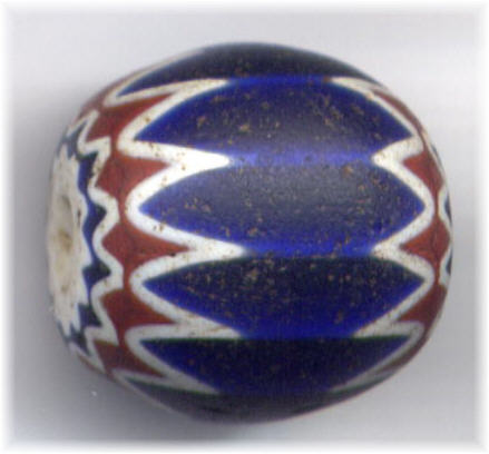 Chevron bead, Venetian.